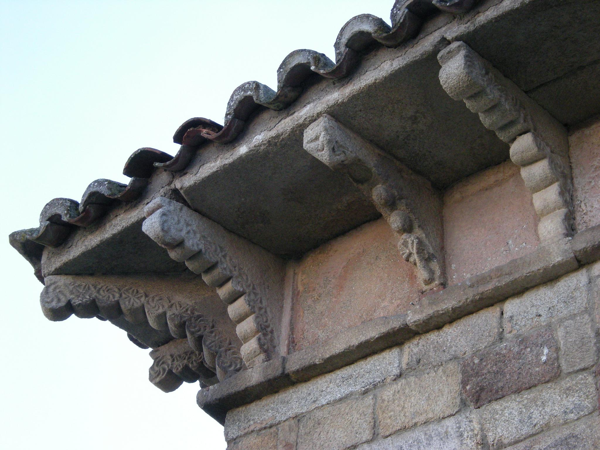 Modillones en la cornisa de la capilla mozárabe de San Miguel de Celanova. Esta foto participó en el juego En un lugar de Flickr.